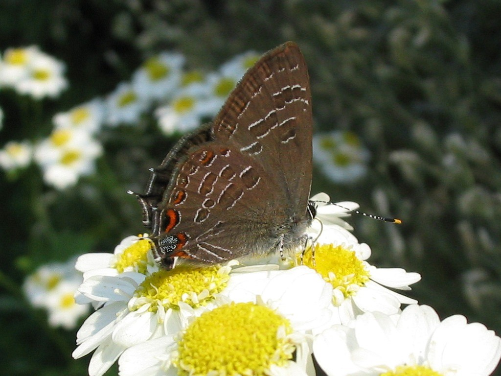 Satyrium liparops (Boisduval & Leconte, 1833) ssp. strigosum. Porte-queue à lignes brisées -- Striped Hairstreak. North American insect (order Lepidoptera) Insecte nord-américain (ordre des lépidoptères) Bas-Saint-Laurent -- Province de Québec -- Canada. 7635-2005, Canon PowerShot A70, Prise en juillet 2005 -- Taken in July 2005